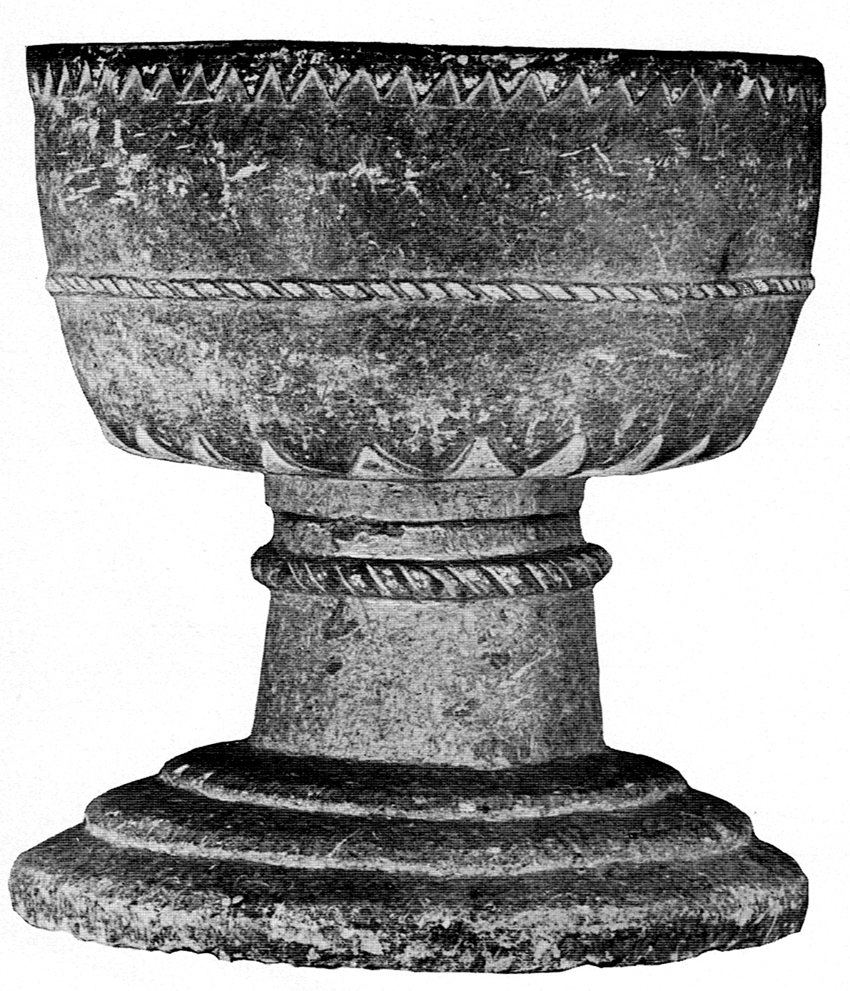 Vårviks kyrka. Dopfunt.